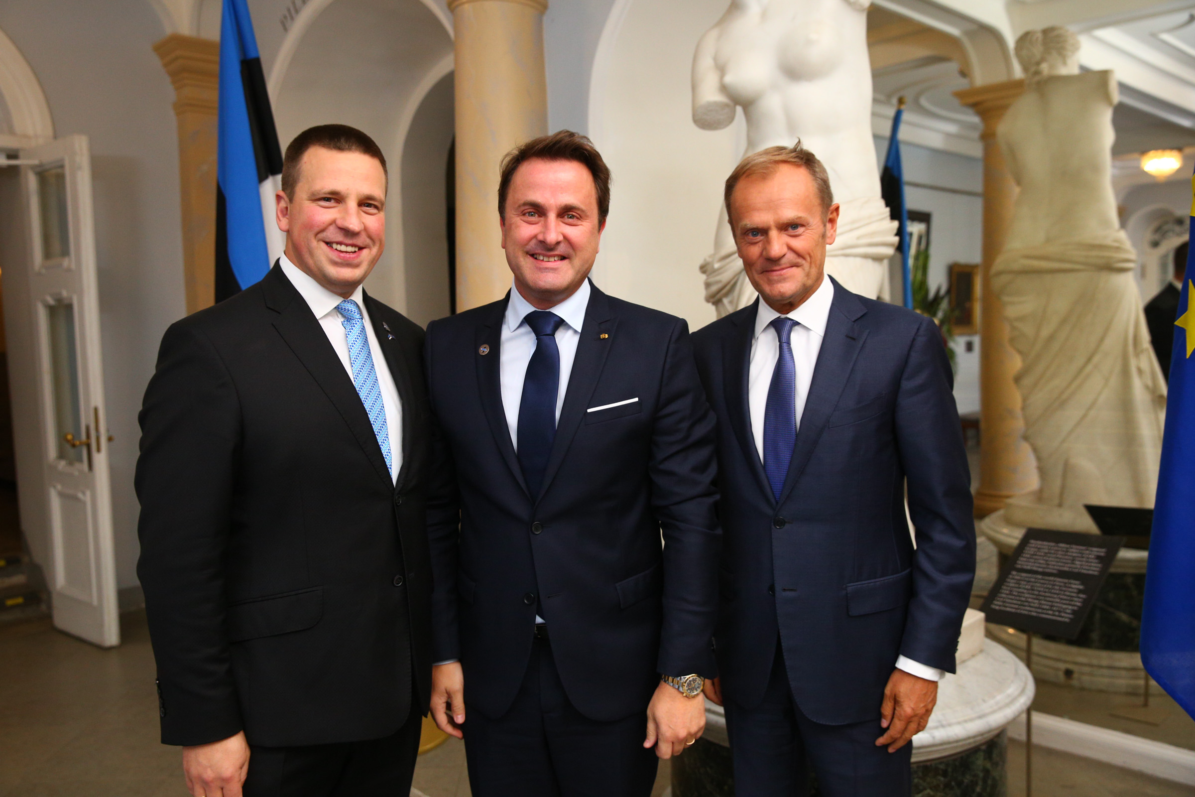 Photo: Arno Mikkor (EU2017EE)